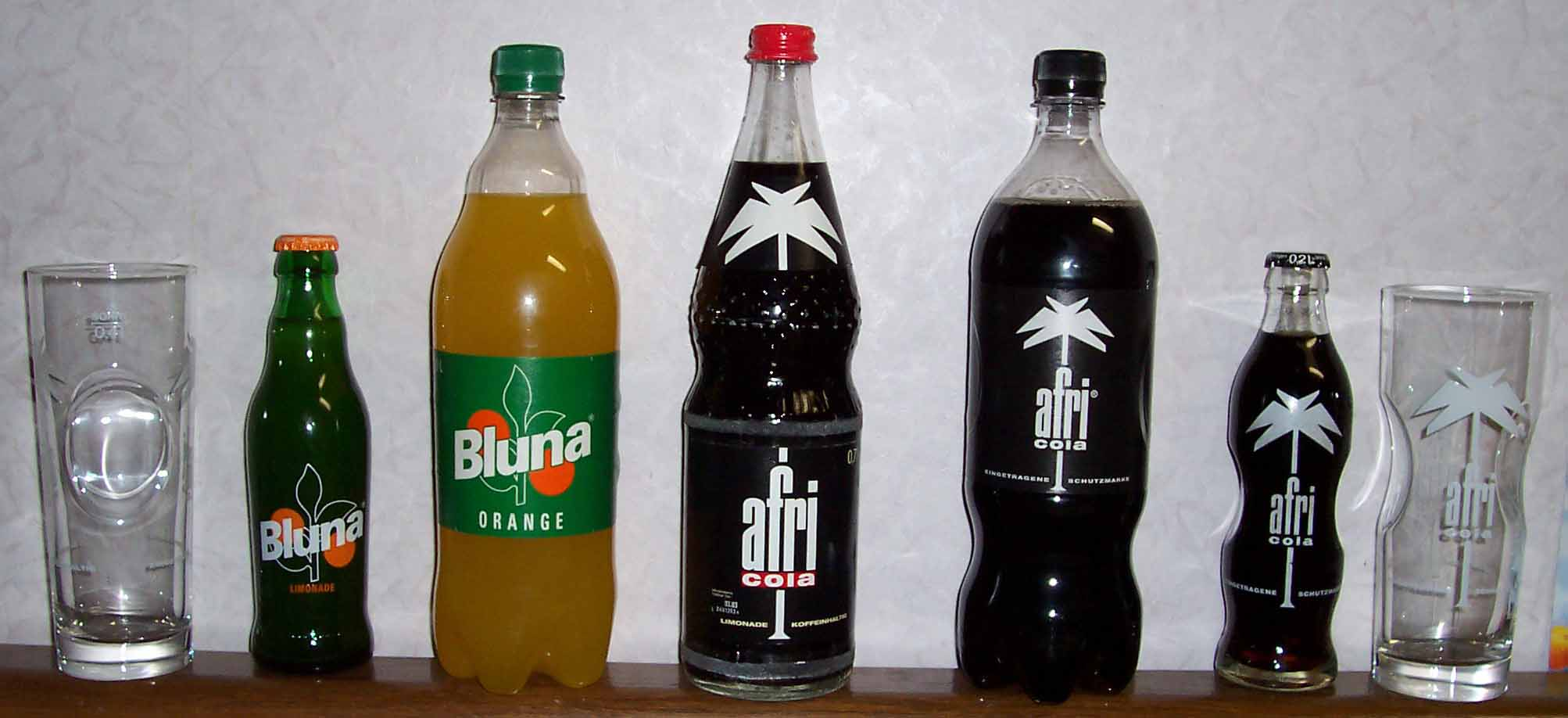 afri-cola Flaschen Bluna Limonaden Flaschen afri-cola Gläser